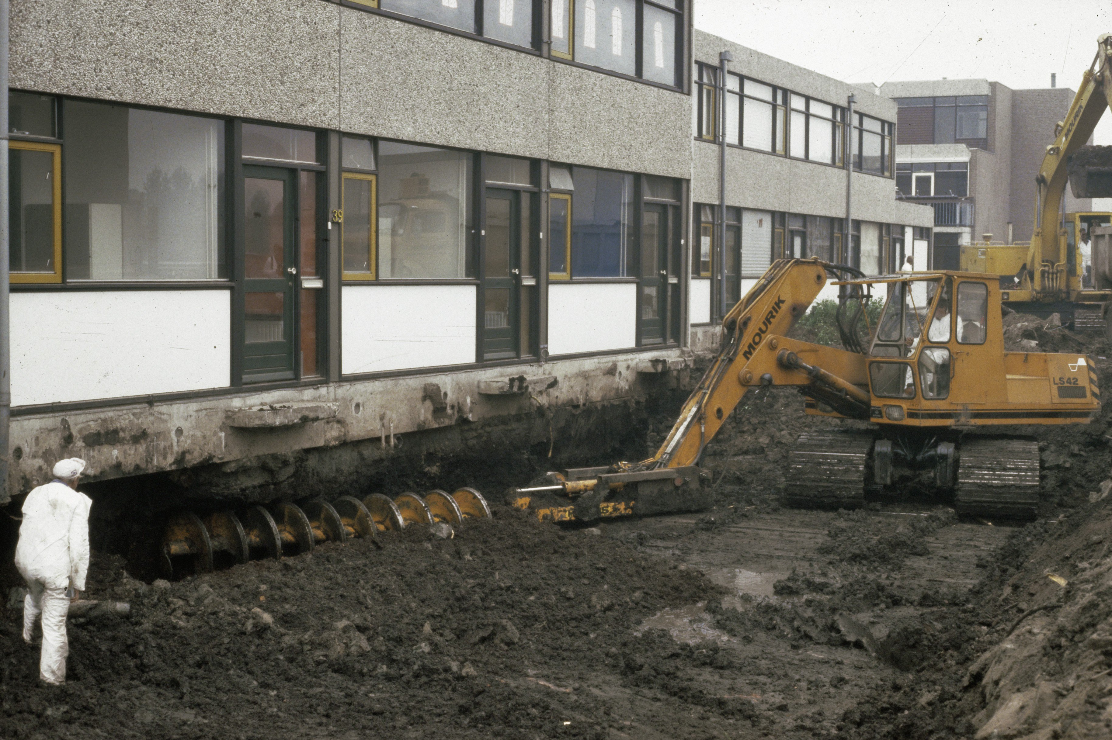 Ontgraving gif grond in Lekkerkerk West ; graafmachine aan het werk.